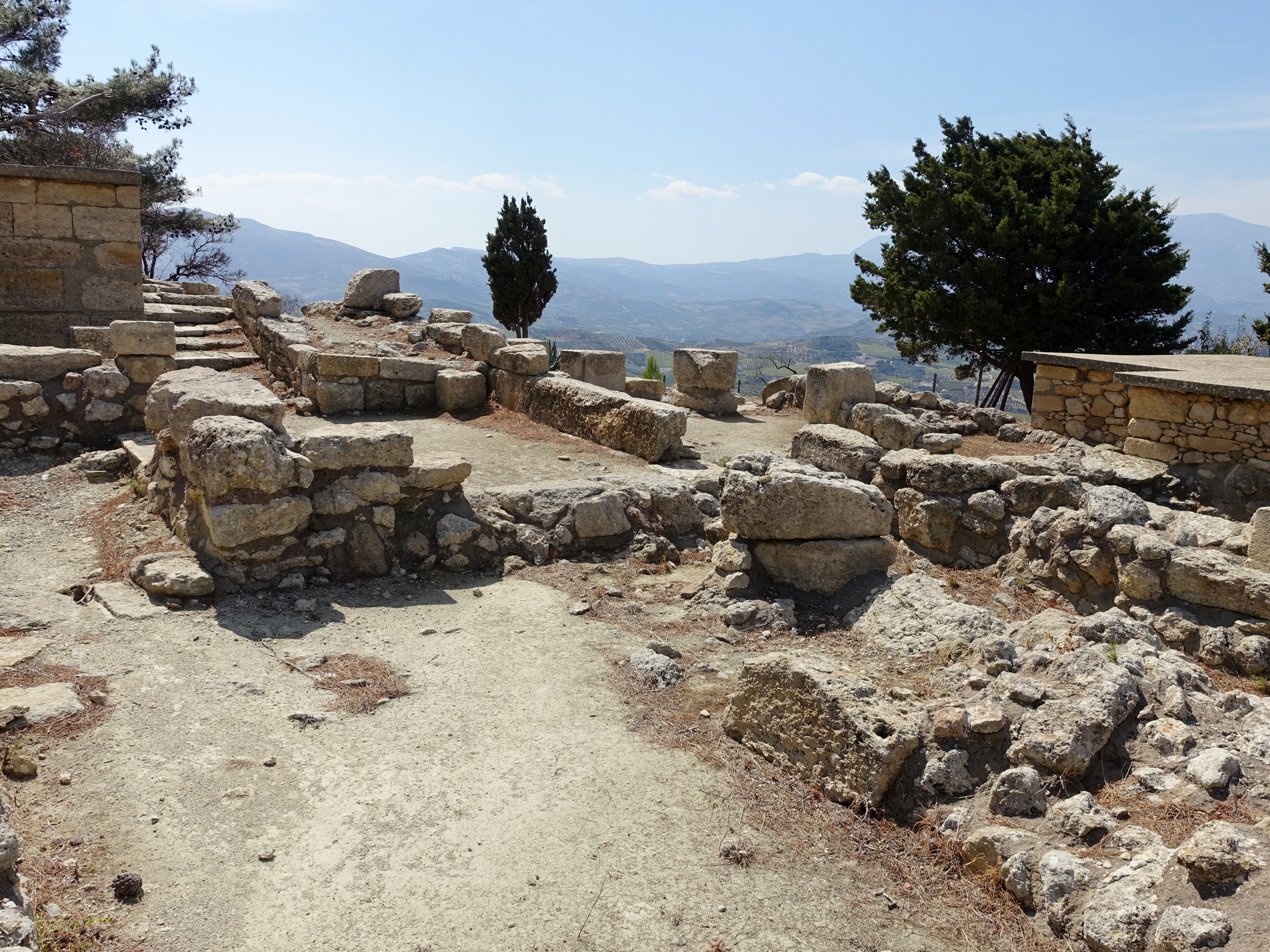 Ausgrabungsstätte der „Villa“ von Vathypetro (Βαθύπετρο), Gemeinde Archanes-Asterousia, Kreta, Griechenland